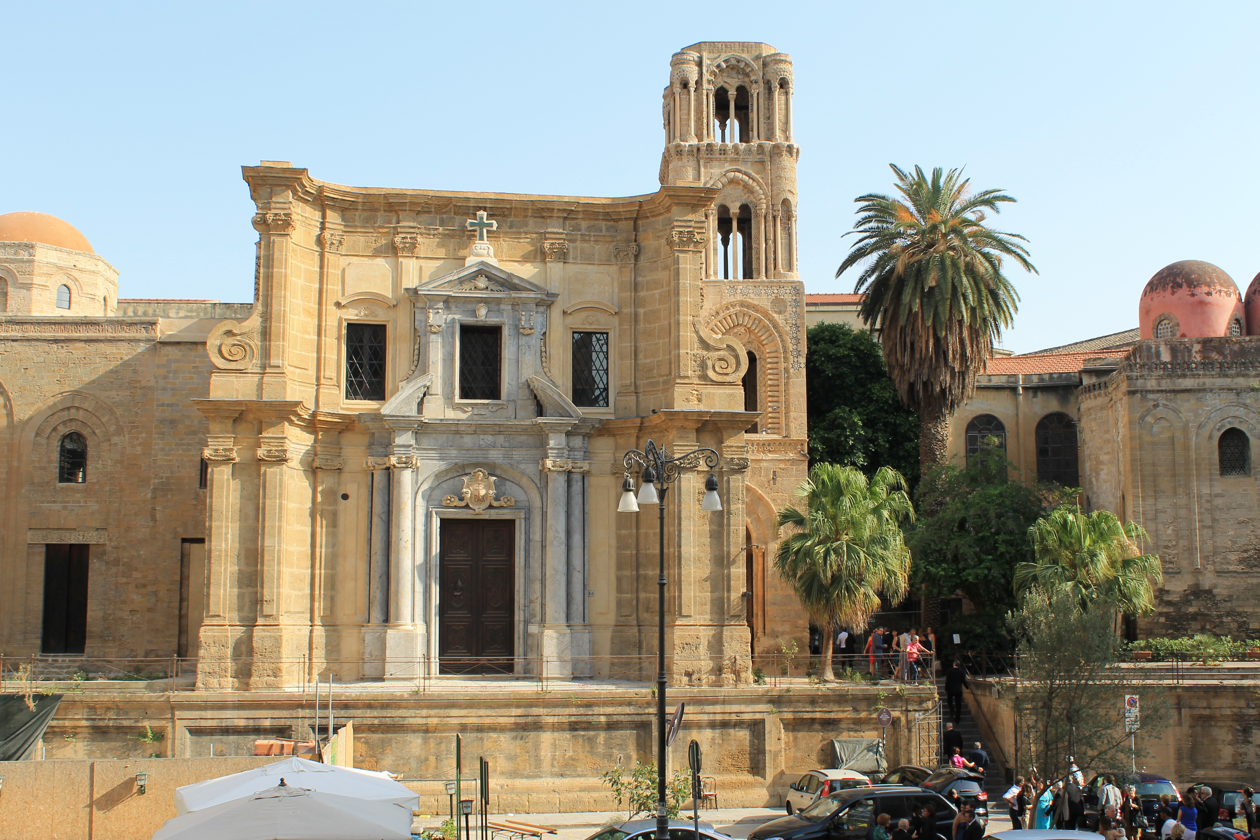 Palermo